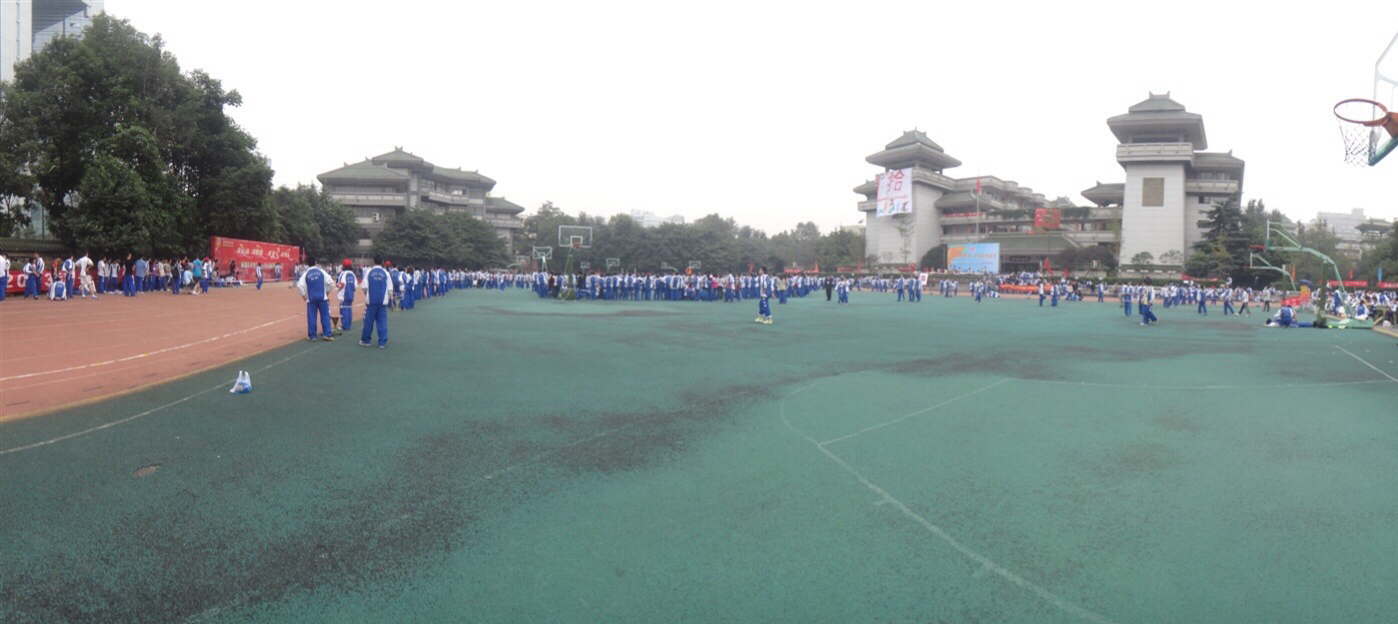 石室中学的操场，拍摄于2012年秋季校运动会期间。